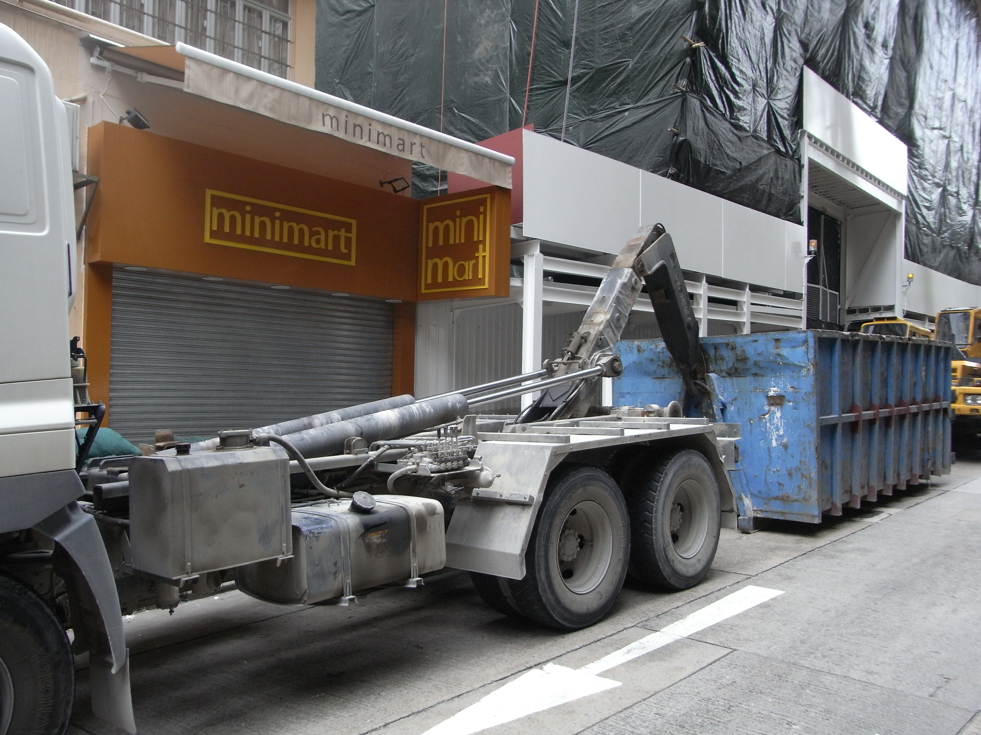 香港西營盤第三街建築地盤環保斗勾車